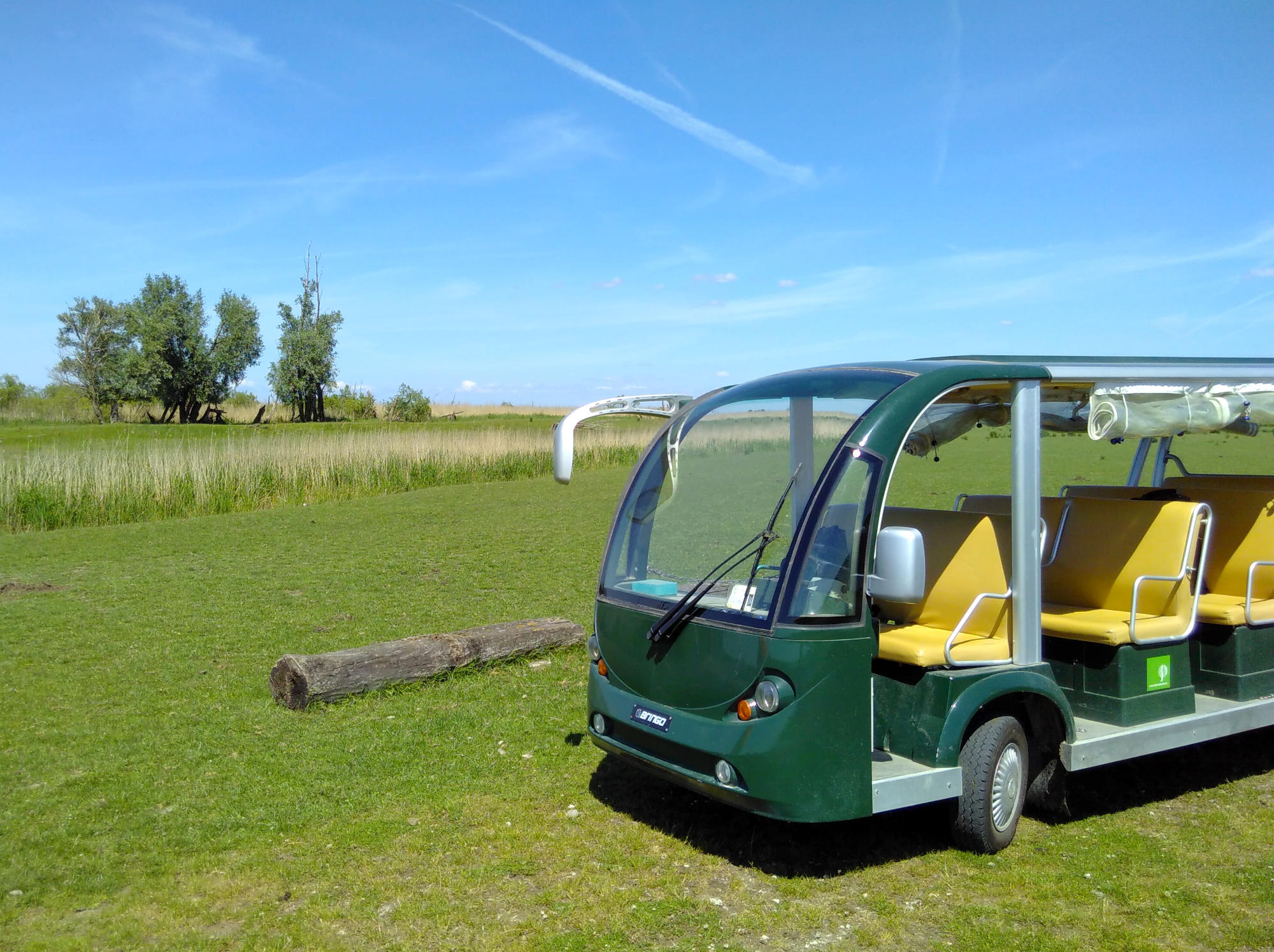 Bringo elektrisch voertuig in Oostvaardersplassen (2017)